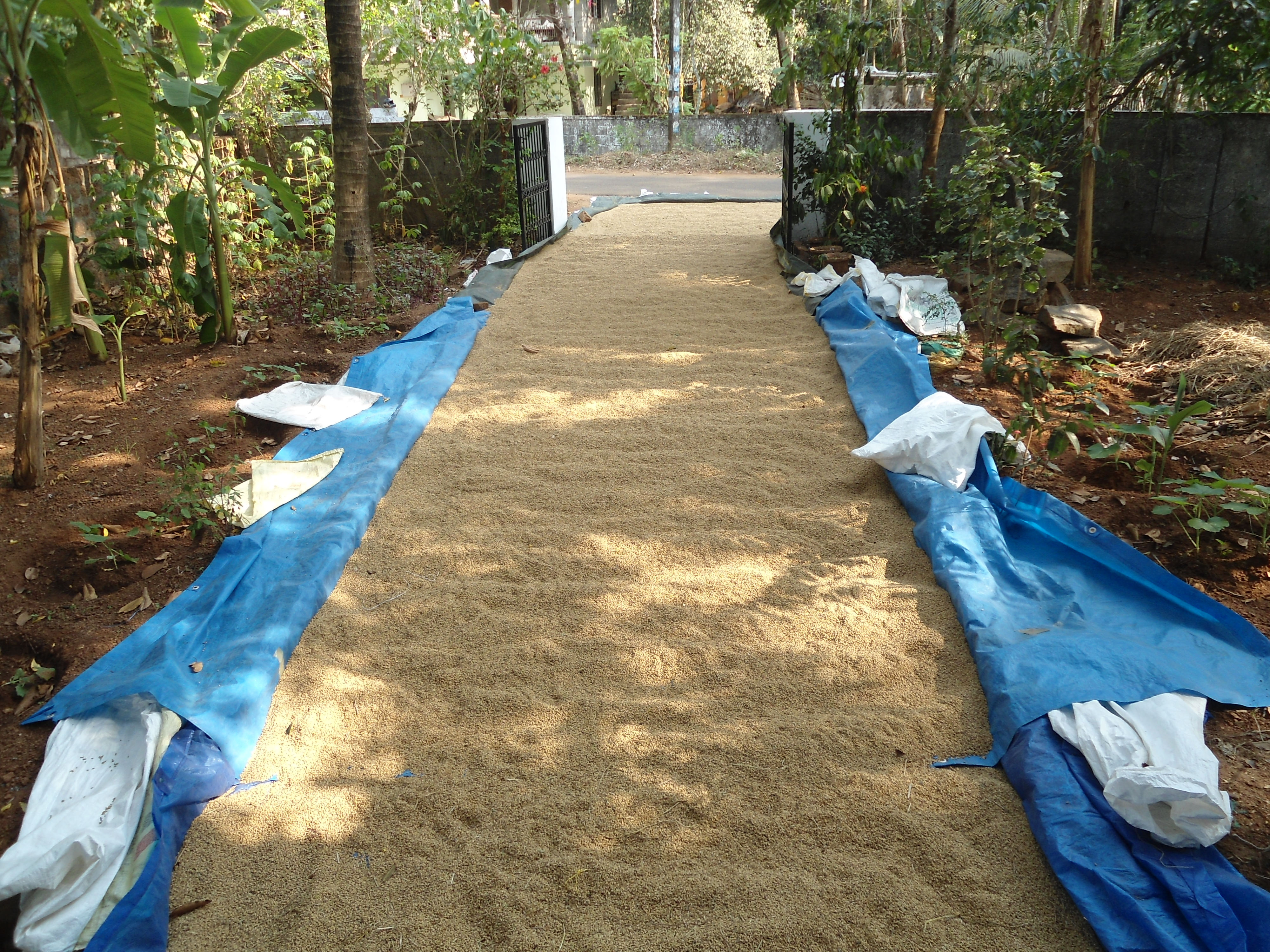 വീട്ടുമുറ്റത്തെ നെല്ല് ഉണക്കല്‍. തൃശ്ശൂരില്‍ നിന്നും